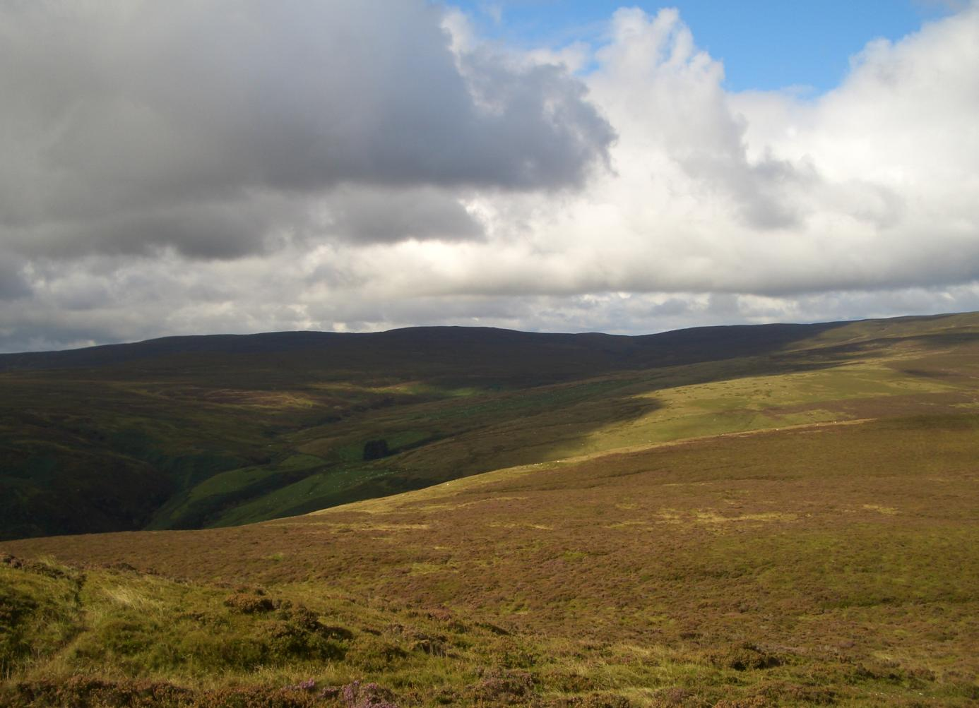 y groes fagl